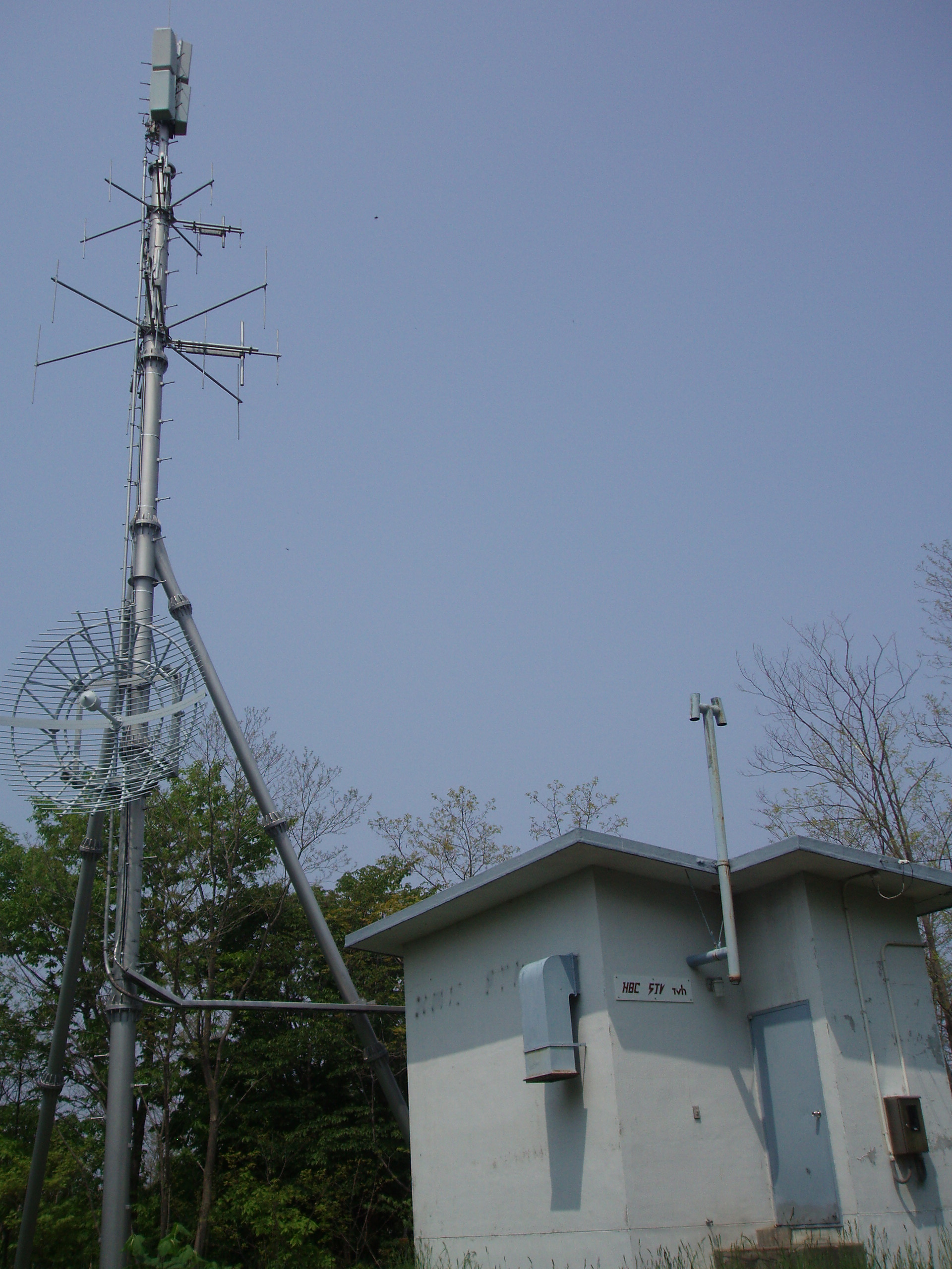 余市中継局 HBC・STV・TVh送信設備